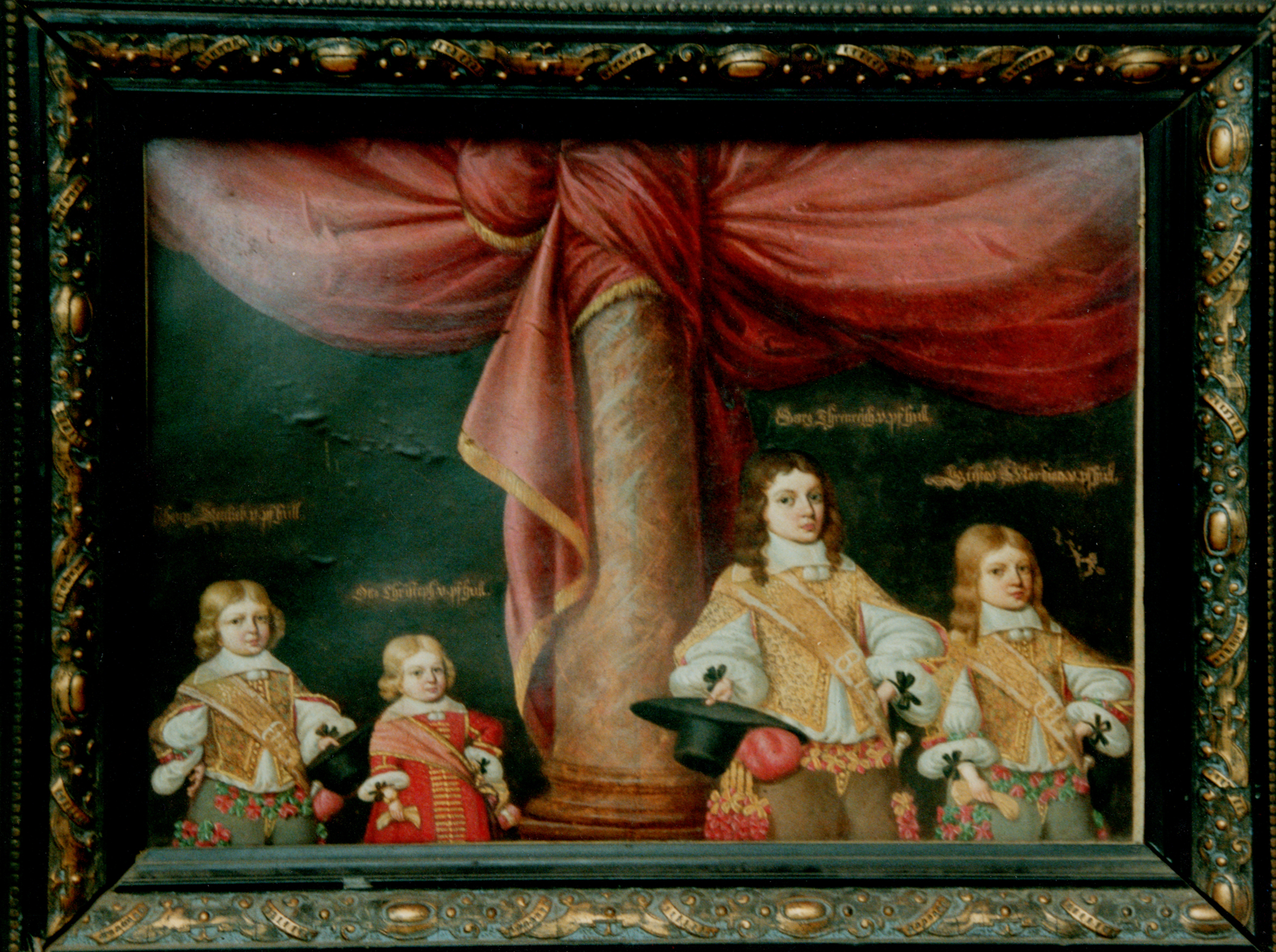 Kinder der Familie von Pfuel